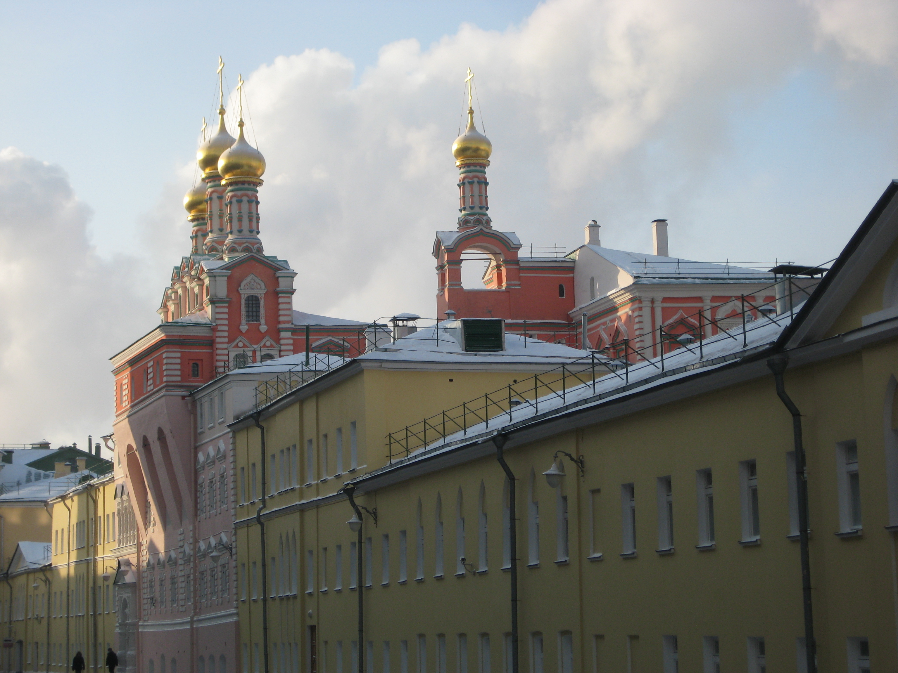 Потешный дворец